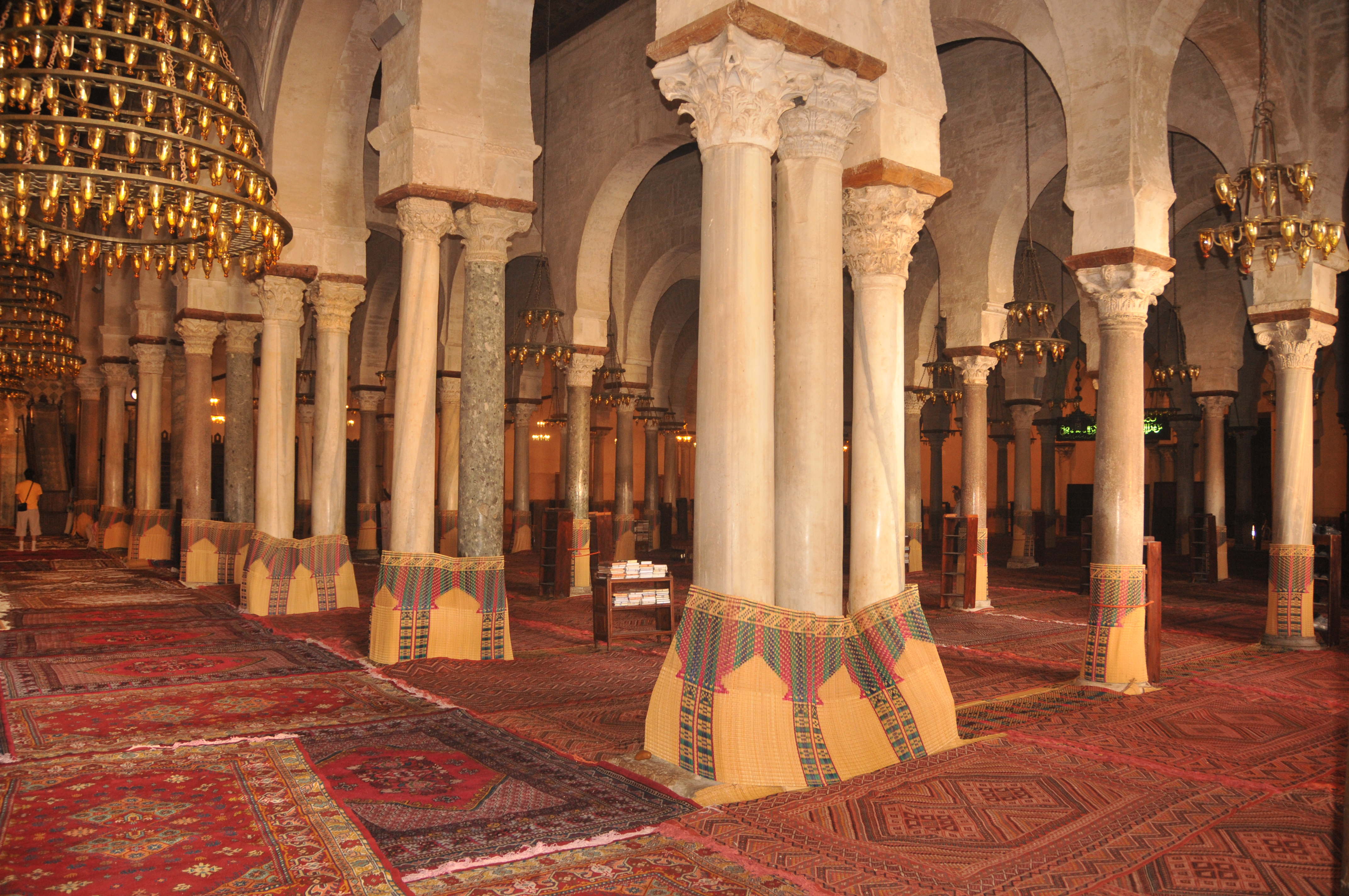 Salle de prière de la grande mosquée de Kairouan, Tunisie